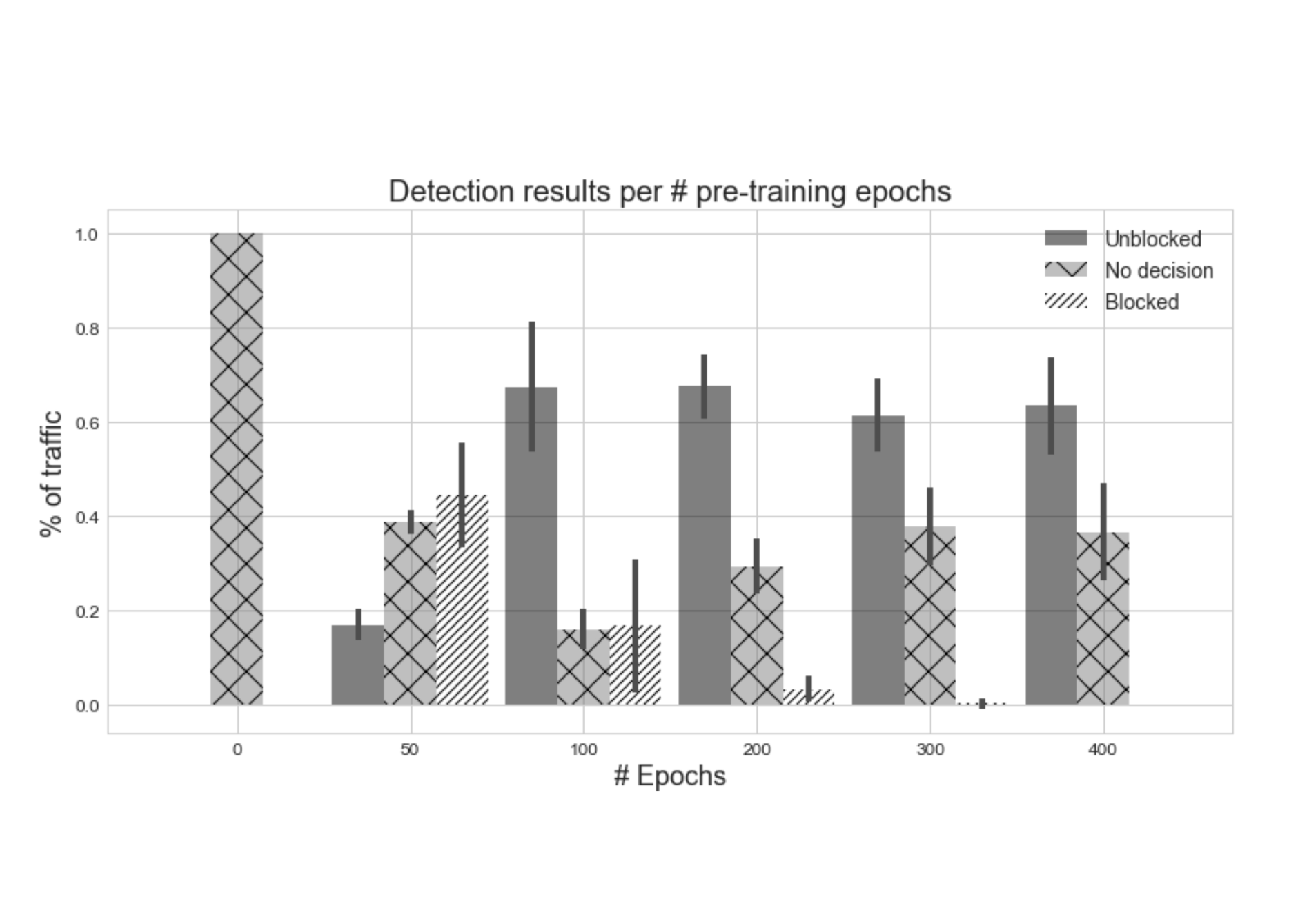 Результаты обнаружения для каждой из предварительно обученных моделей. Ось X представляет количество обучающих эпох, а ось Y - средний процент трафика, который был заблокирован, разблокирован или разблокирован из-за отсутствия решения.